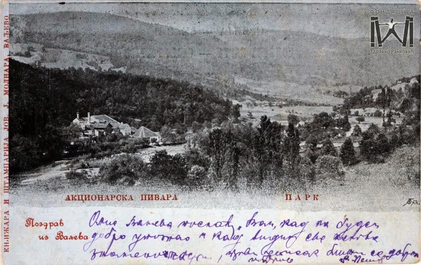 Prva razglednica